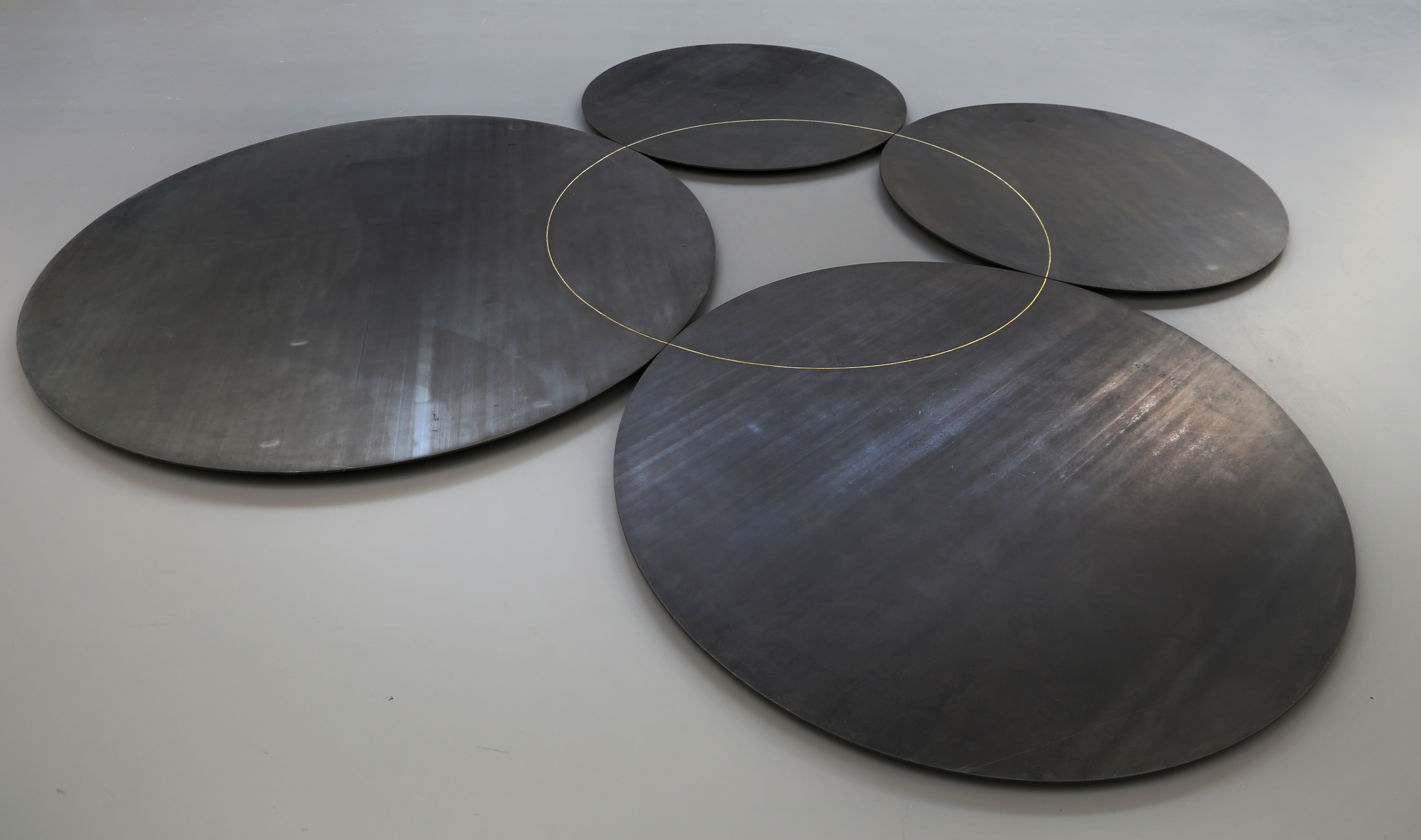 Centro per l'arte contemporanea Luigi Pecci This is a photo of a monument which is part of cultural heritage of Italy.